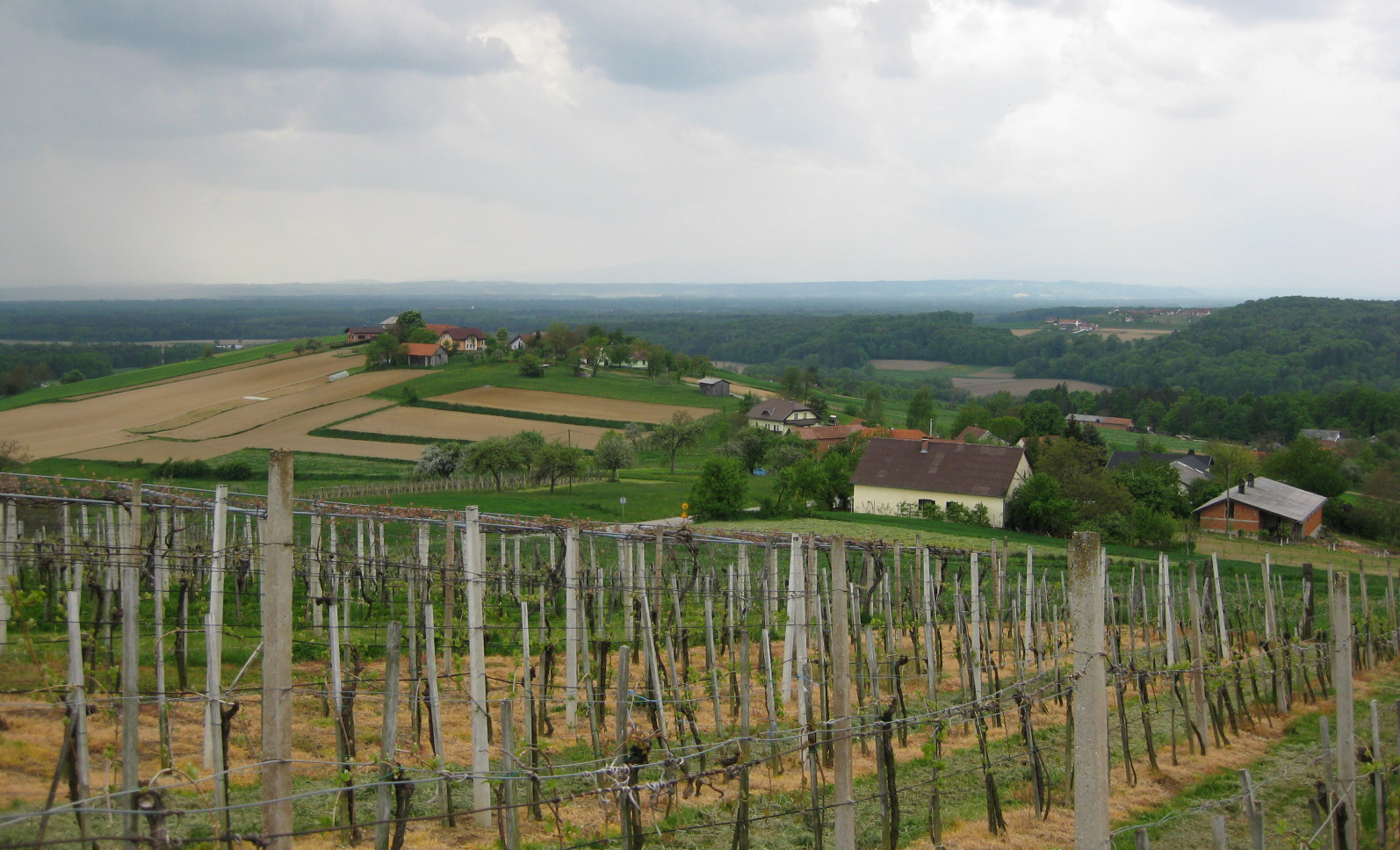 Gerlinci, village in Slovenia